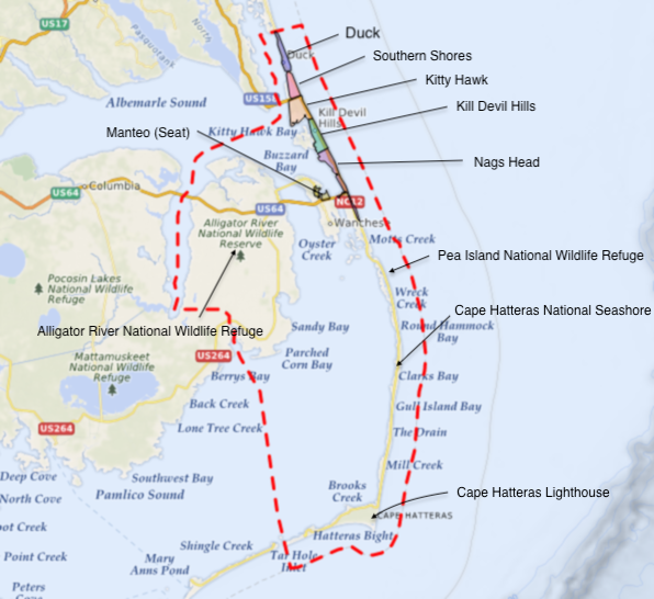 carte réalisée sur umap